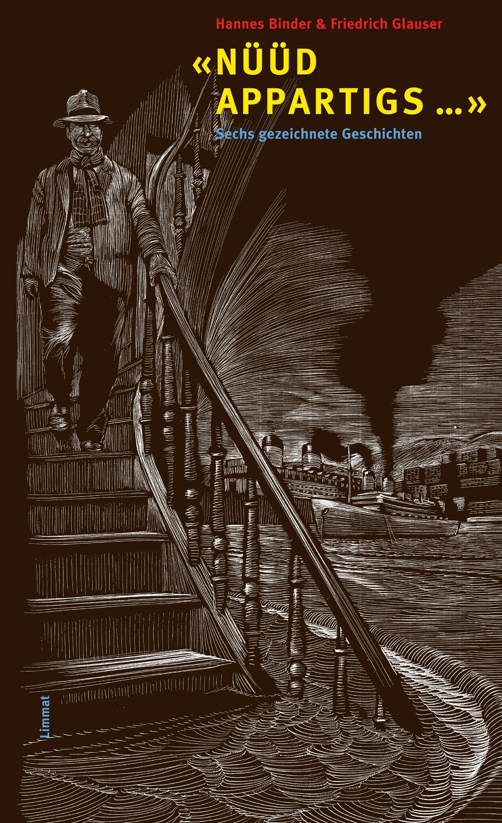 Buchcover von "Nüüd appartigs" (Friedrich Glauser/Hannes Binder) in der Buchausgabe des "Limmat Verlags", Zürich 2005. Umschlagentwurf: Hannes Binder